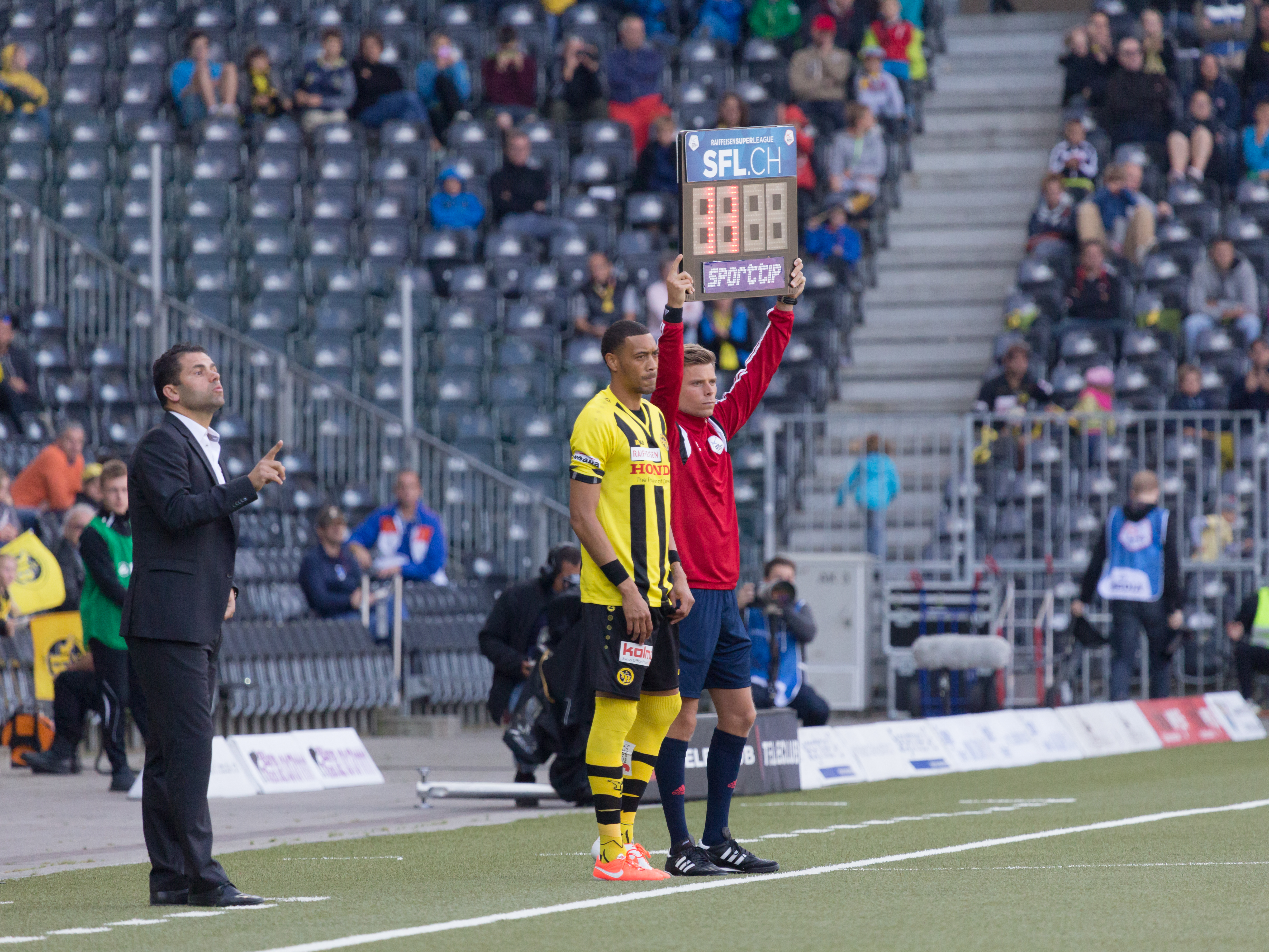 Guillaume Hoarau bei seinem Pflichtspieldebut für den BSC Young Boys: Einwechslung für Renato Steffen im Spiel gegen den FC Luzern